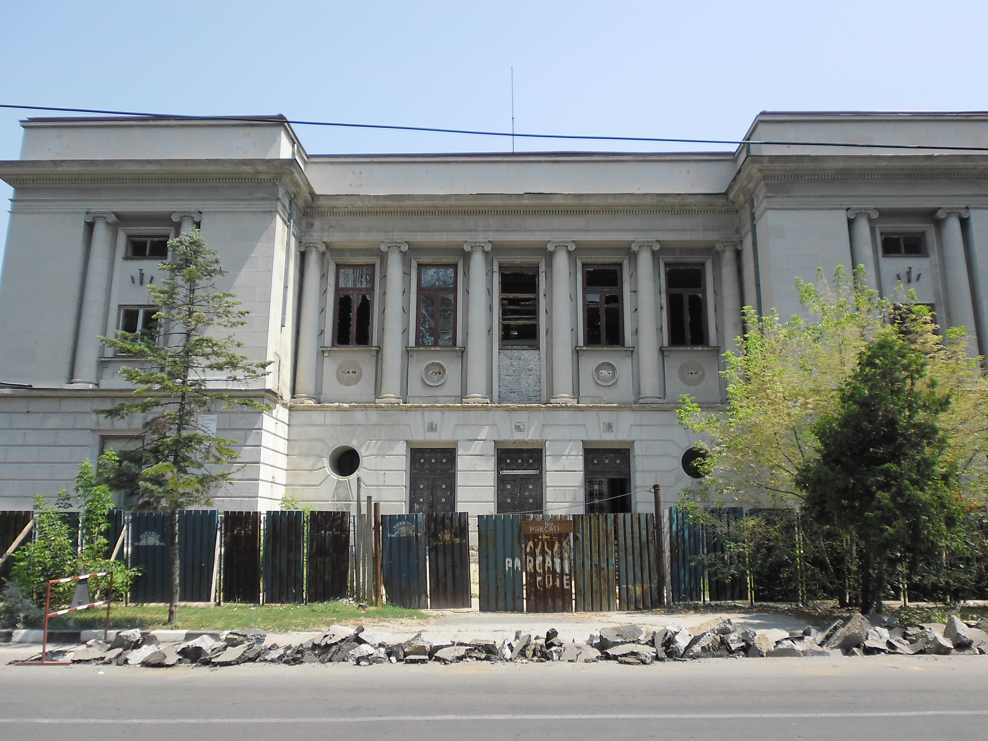 Tribunalul, azi Prefectura